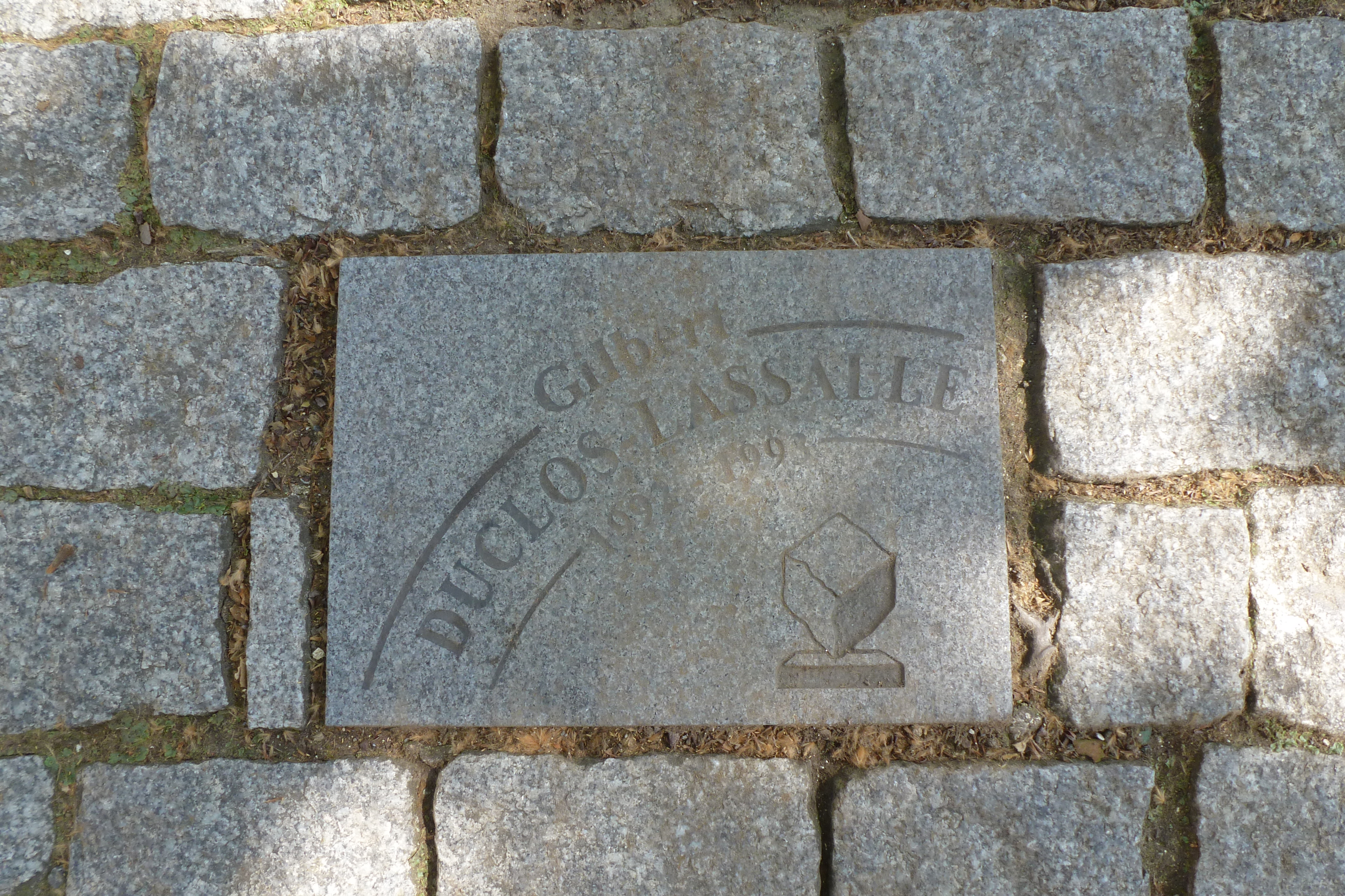 Pflasterstein für Gilbert Duclos-Lassalle auf der Allée Charles Crupelandt in Roubaix